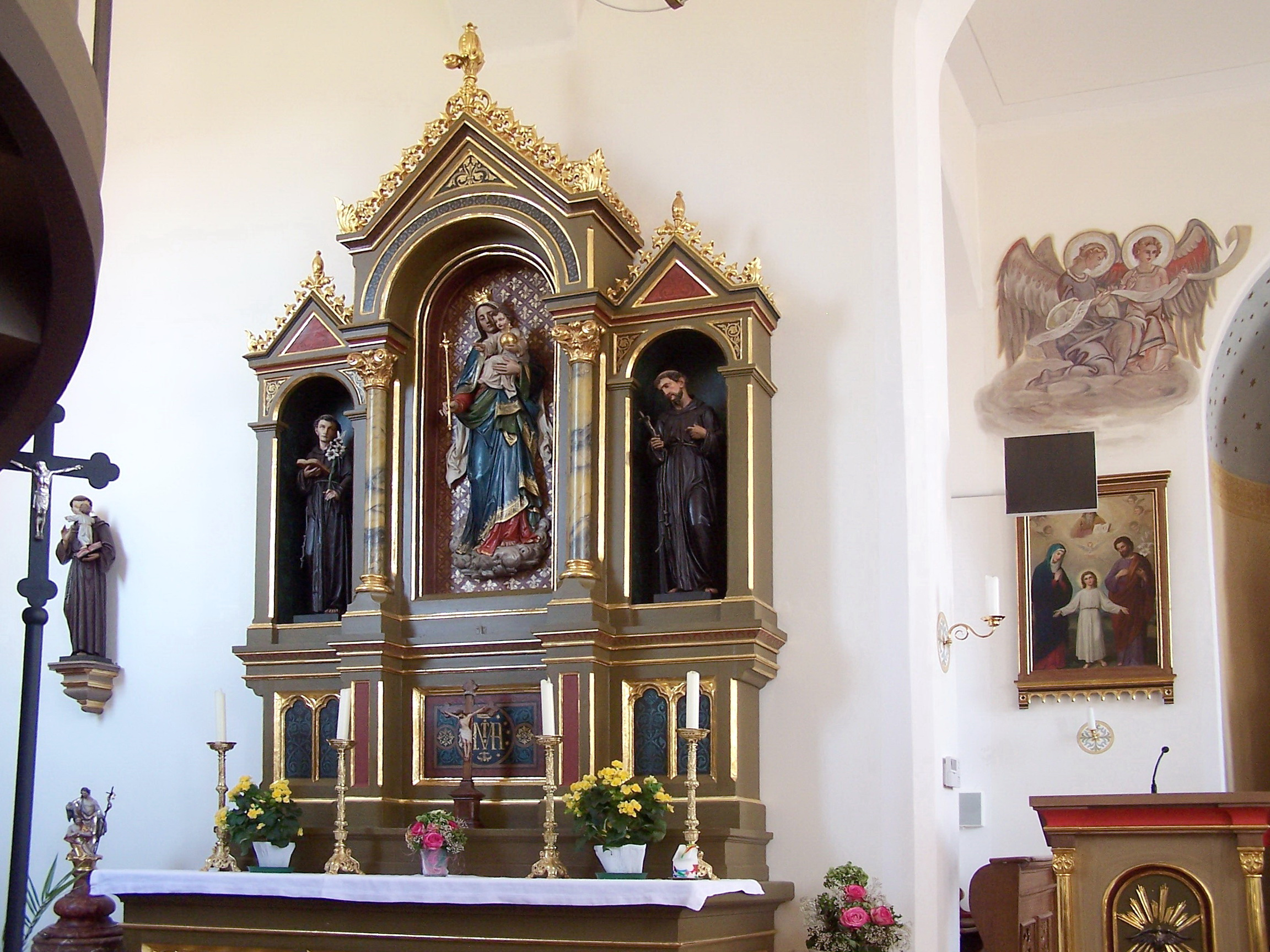 Furth in Niederbayern, Schatzhofen Nr. 14. Pfarrkirche St. Michael. Linker Seitenaltar mit Patrona Bavaria und zwei Seitenfiguren in Schreinen.